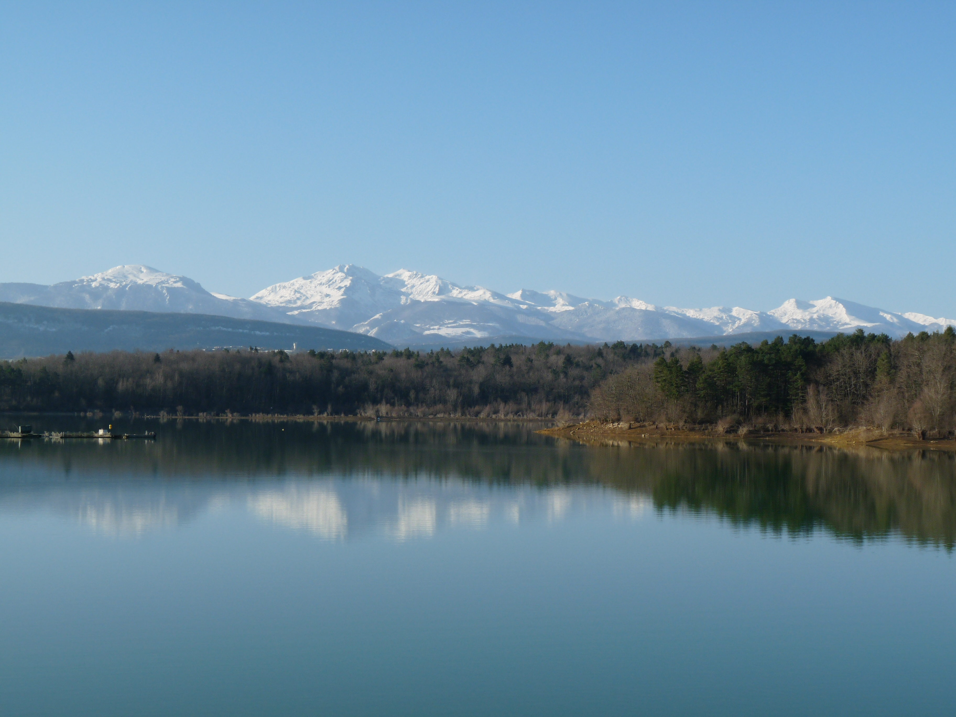 Reflets du massif de Tabe dans le lac de Montbel (Ariège)